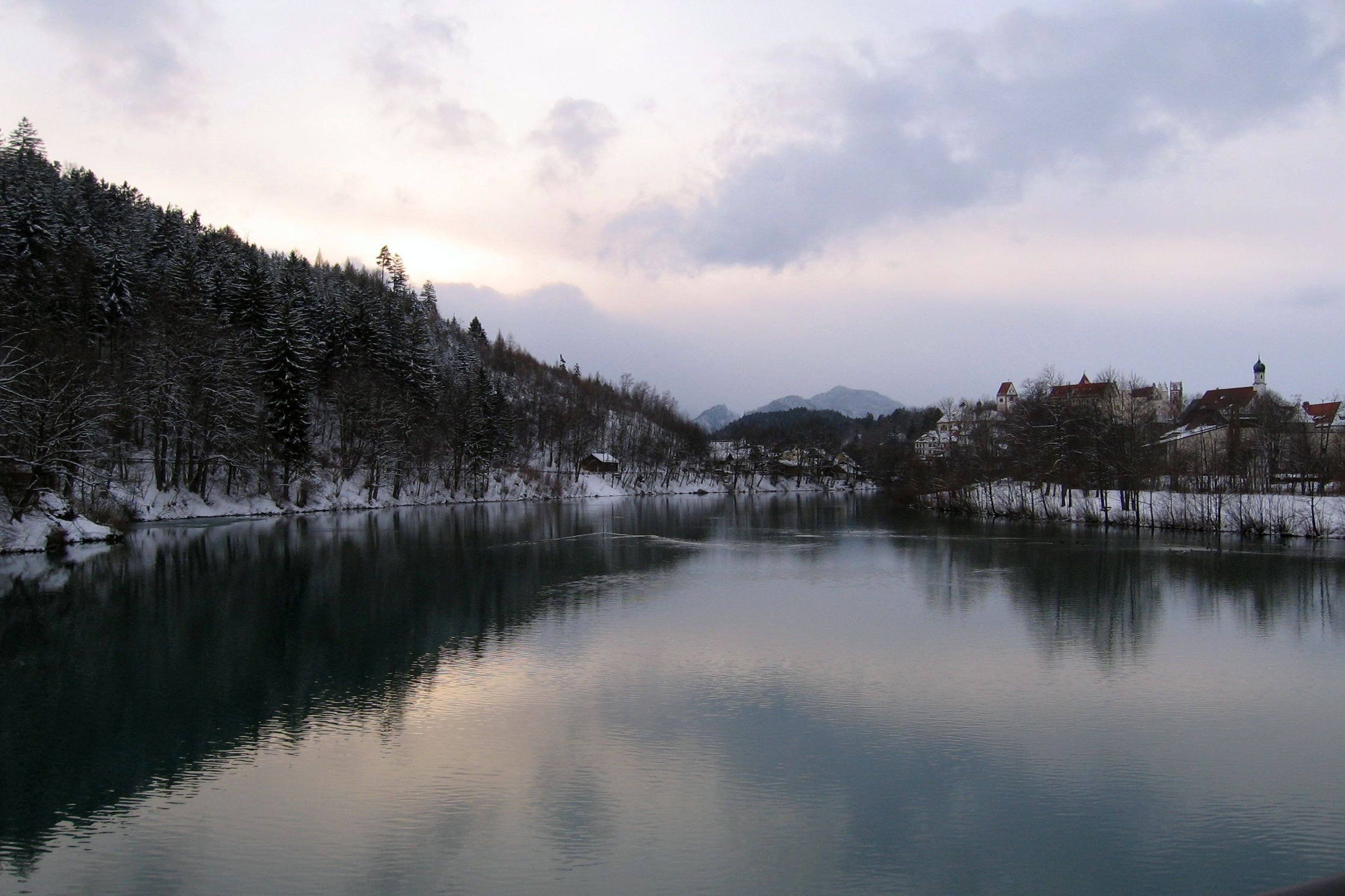 Zusehen ist der Fluss Lech in Füssen